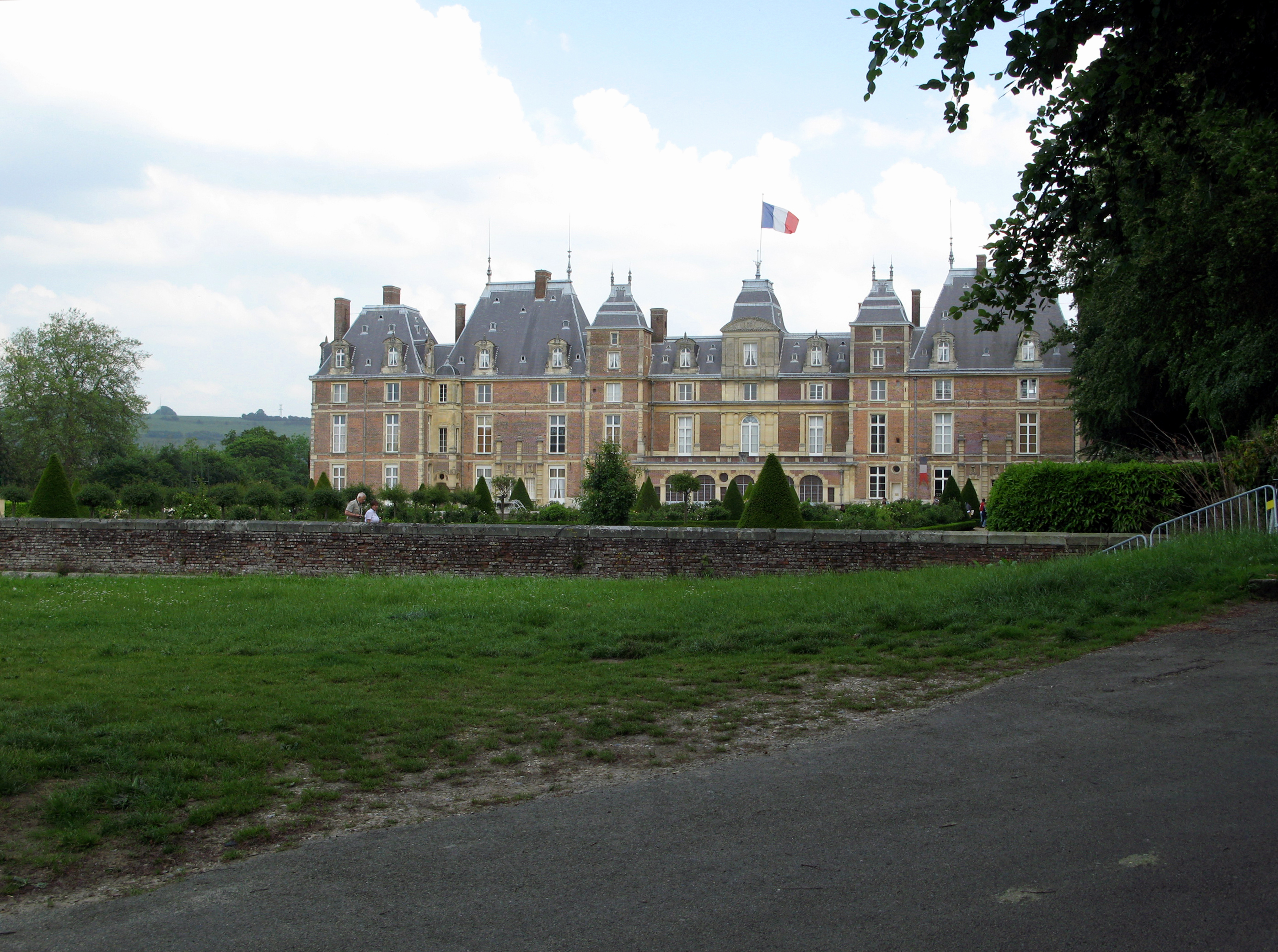 Eu (Seine-Maritime, France) - Façade Ouest du château. On voit bien le mur délimitant le "jardin à la Française", mais on ne soupçonne pas ici le fossé creusé au pied de ce mur. .